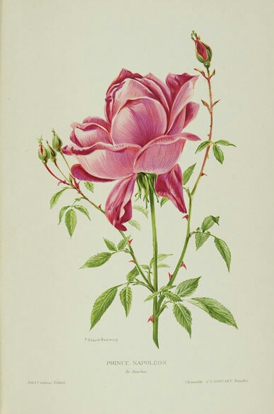 Illustration de P. Seguin-Bertault, rose Bourbon, 'Prince Napoléon' (Pernet, 1864), in Amat, Les plus belles roses au début du XXe siècle (1912).